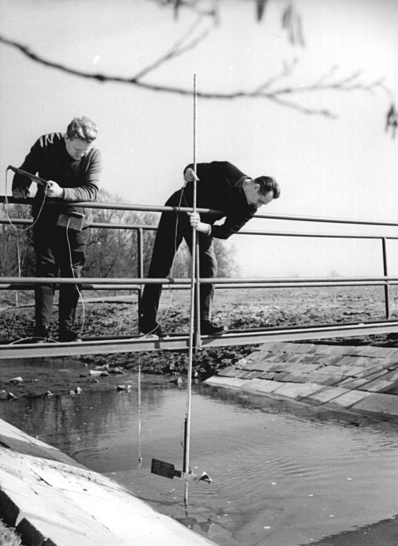 Talsperre Brohm, Messung des Durchflusses ADN-ZB Bertocha-28.3.72 Neubrandenburg:Wassersorgen auch im seenreichsten Gebiet der DDR.Der gegenwärtige Wassermangel fordert von den Mitarbeitern der Oberflußmeisterei Peene Neubrandenburg eine aufmerksame Kontrolle des Wasserstandes.Bei anhaltenden Rückgang der Wasserstände im seenreichsten Gebiet der DDR treffen sie Entscheidungen, wie die vorhandenen Reserven am zweckmäßigsten eingesetzt werden.Hans Utrecht(l.) und Herbert Schmidt sind auf unserem Foto bei Durchflußmessungen am Zulauf zur Talsperre Brohm.